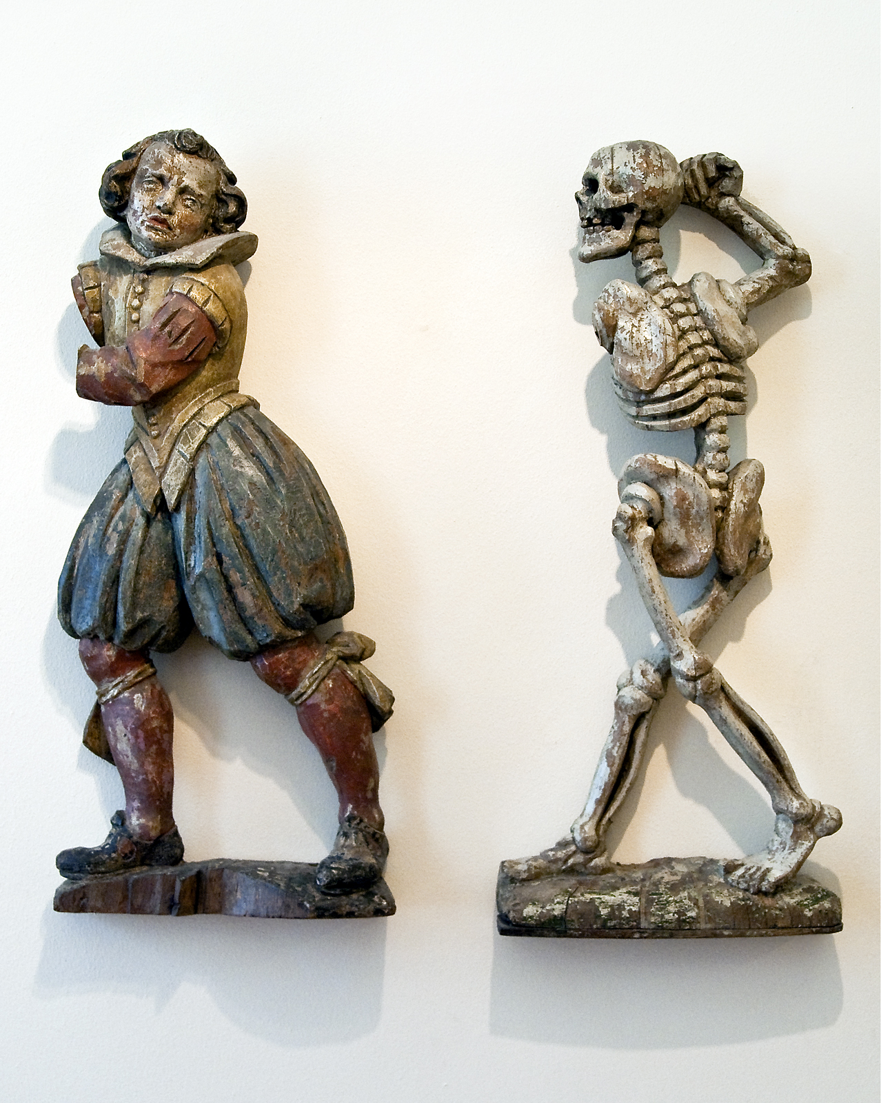 Anoniem, Fragmenten van een Dodendans (Jongeling en de dood), ca. 1580 Anoniem Fragmenten van een dodendans (Jongeling en de dood), ca. 1580